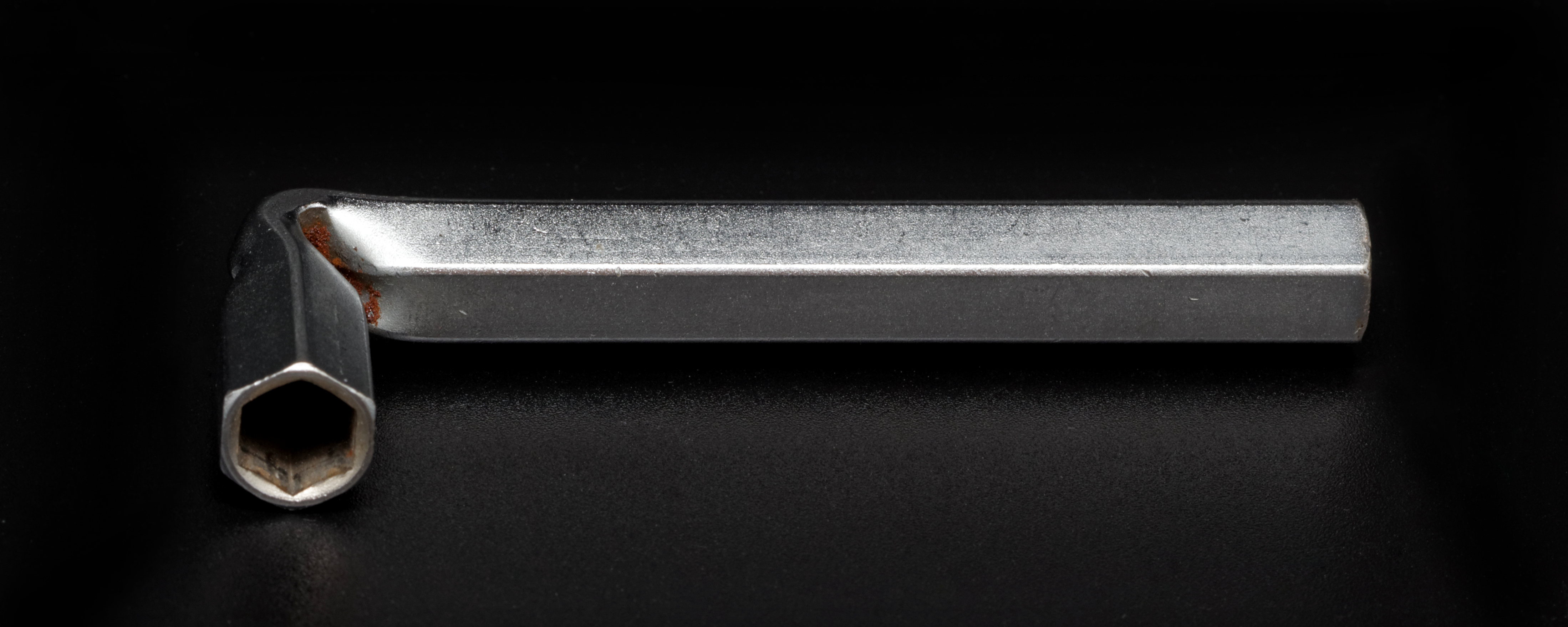 Clé à tube FACOM 9